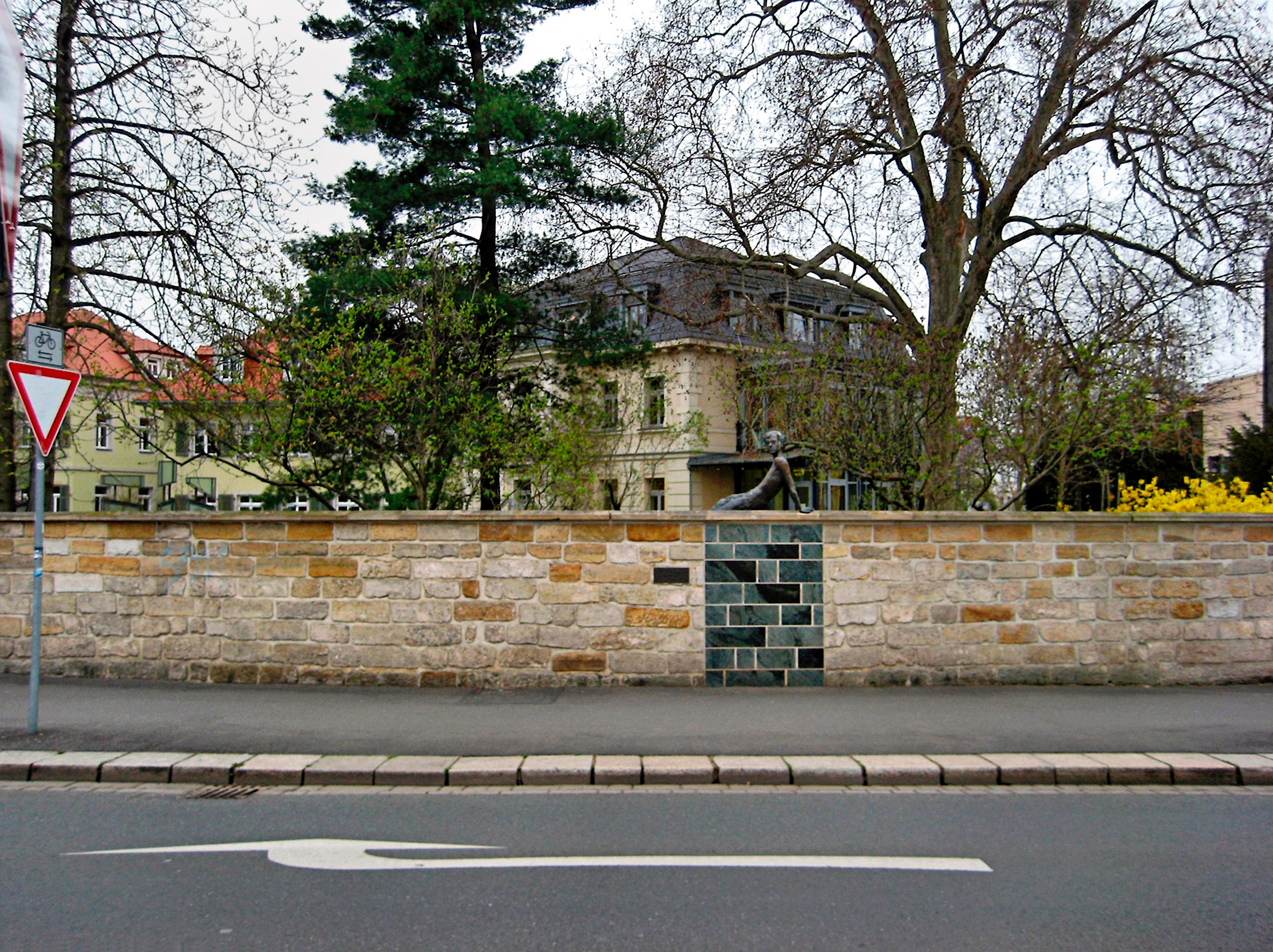 Erich Kästner Gedenkstätte Albertplatz Dresden